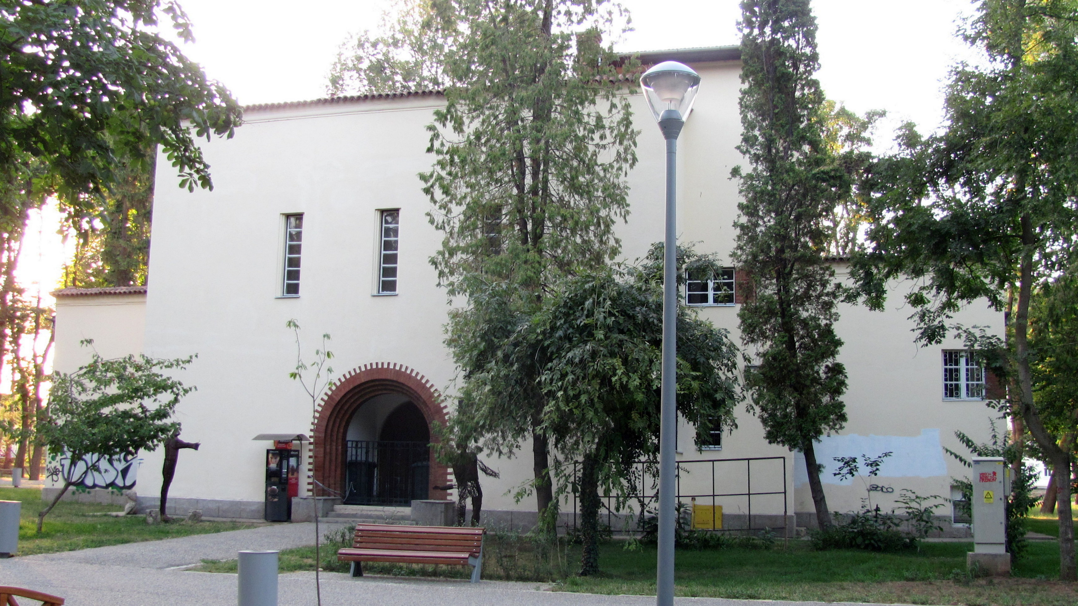 Cluj-Napoca - Parcul Simion-Barnuțiu - Universitatea de Arte si Design 01